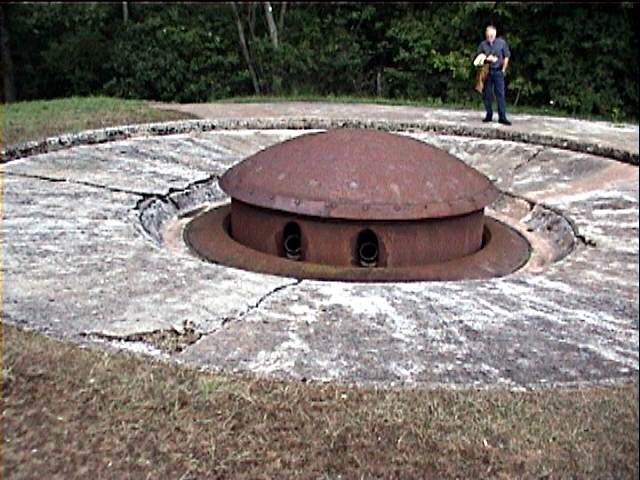 Ouvrage du Hackenberg, bloc 9 Tourelle pour 2 lance-bombes de 135mm en batterie